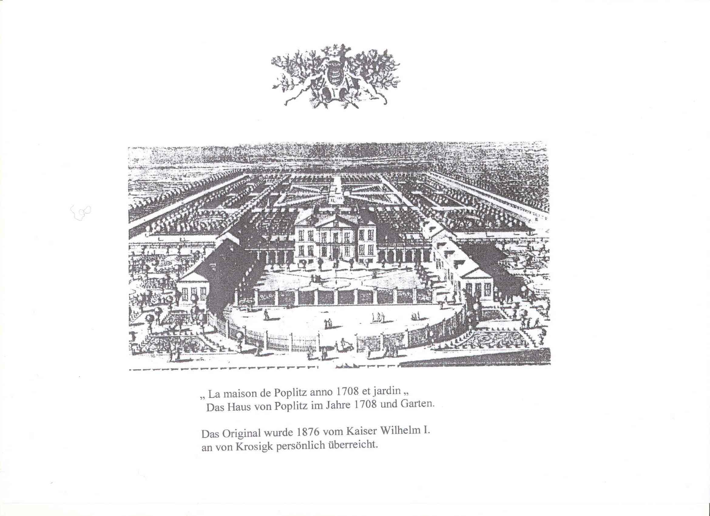 Das Haus von Poplitz im Jahre 1708 und Garten.